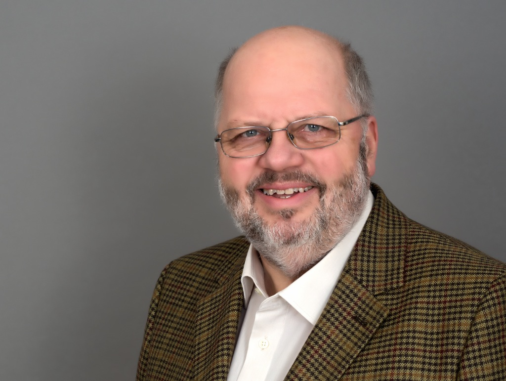 Ein Portrait von Jens Göbel